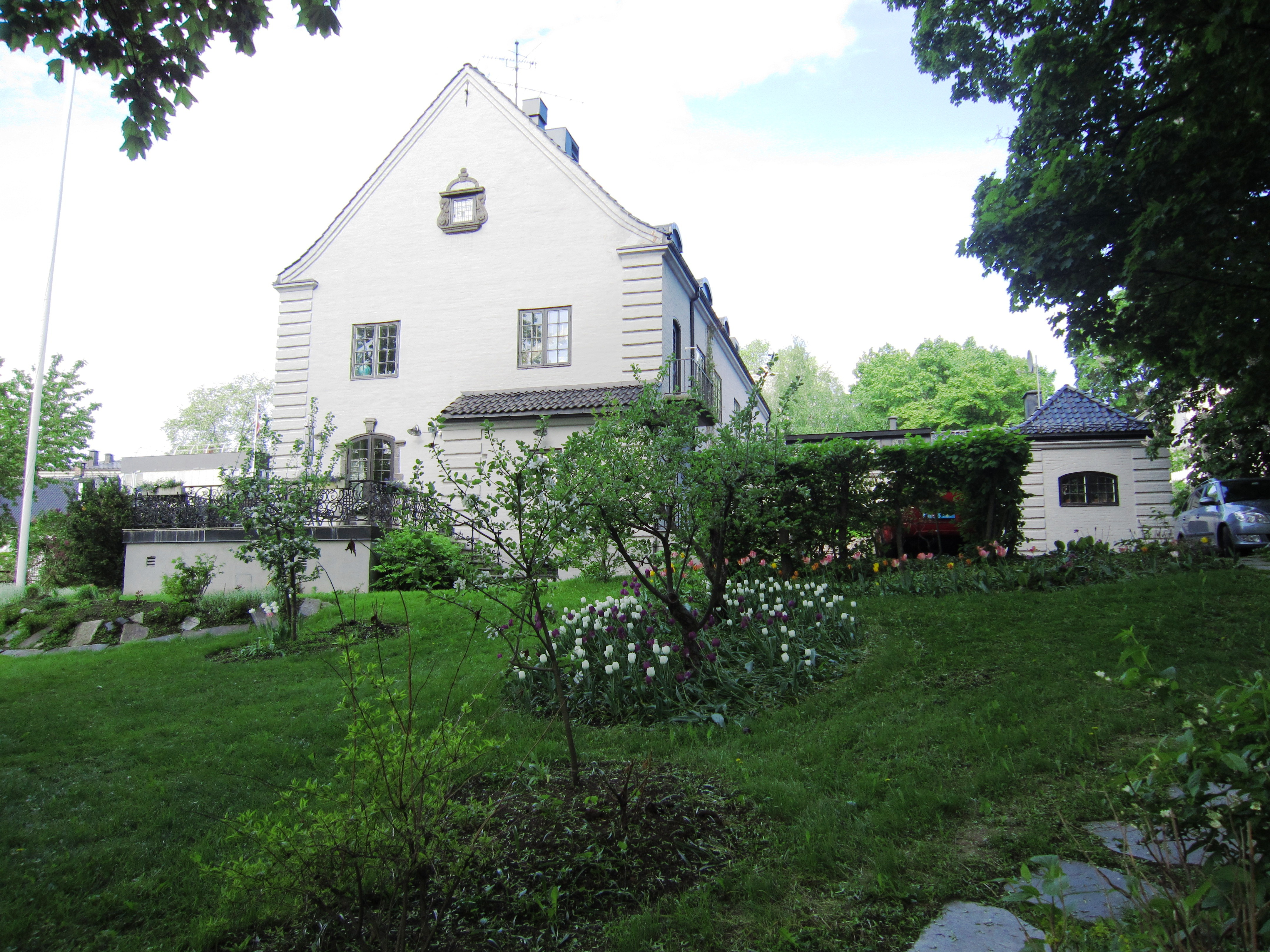 Ambassadørens tjenestebolig